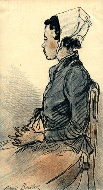 Estampe en couleur, eau-forte: représentant une femme de Cancale, en costume traditionnel, assise sur une chaise, de profil, mains jointes.